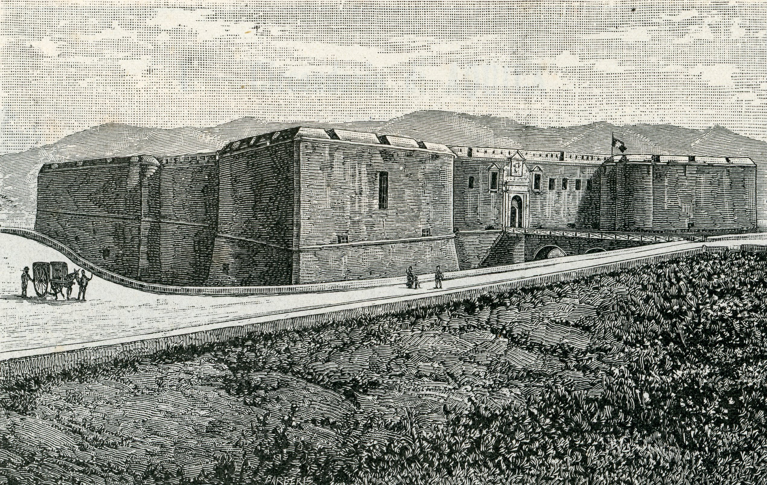 Aquila: il castello (xilografia di Barberis 1898).